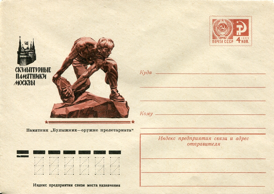 Москва. Памятник Булыжник — оружие пролетариата, почтовый конверт